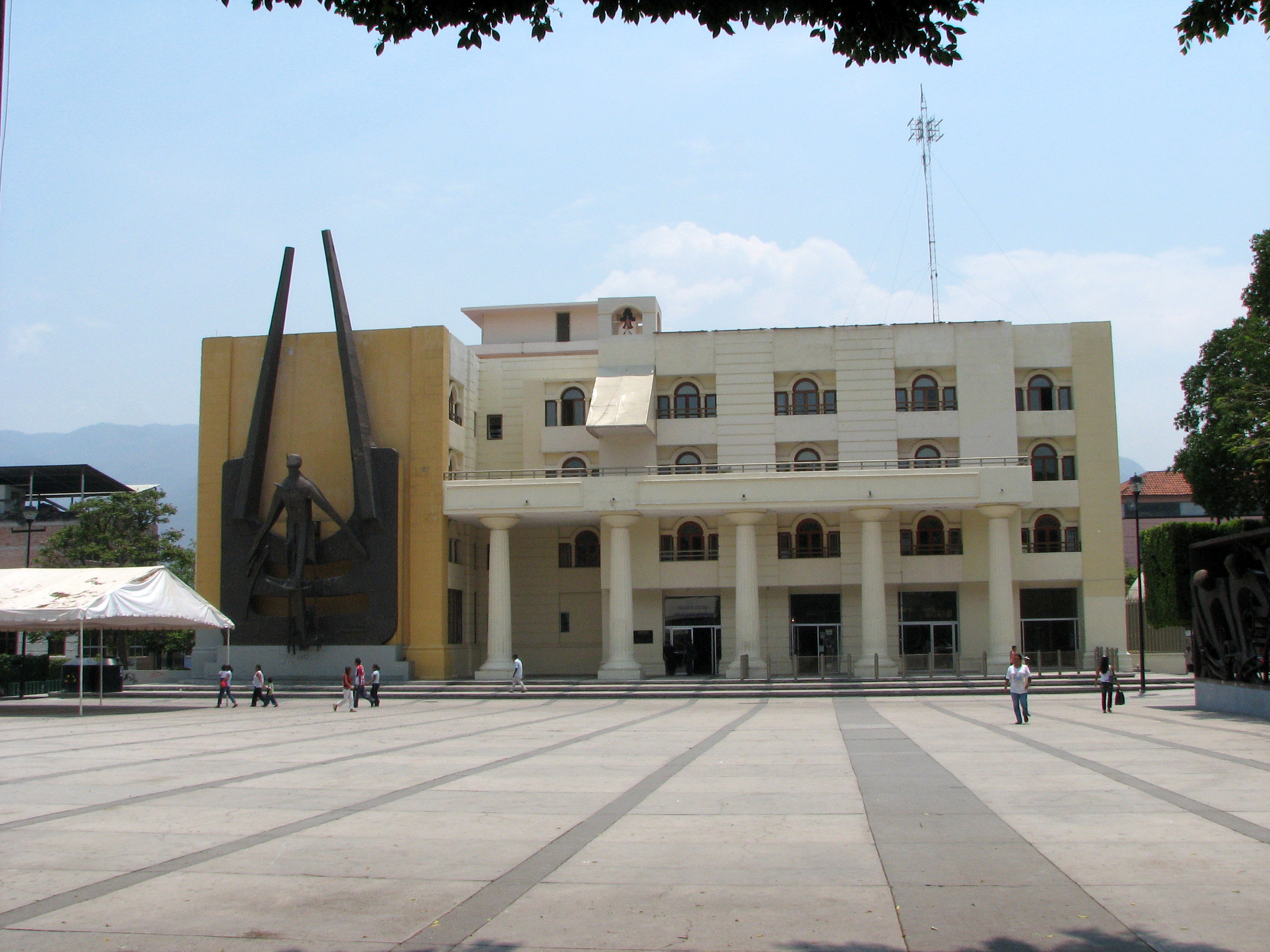 Vista frontal del Antiguo Palacio de Gobierno en Chilpancingo